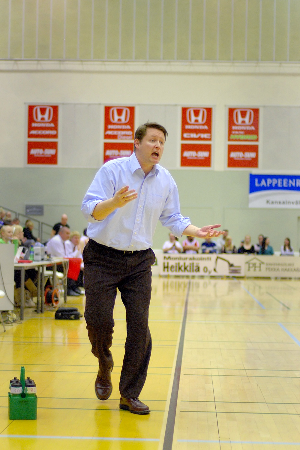 Torpan poikien Korisliigajoukkueen valmentaja Tomi Kaminen ottelussa Lappeenrannan NMKY:tä vastaan Lappeenrannassa 17.2.2010.